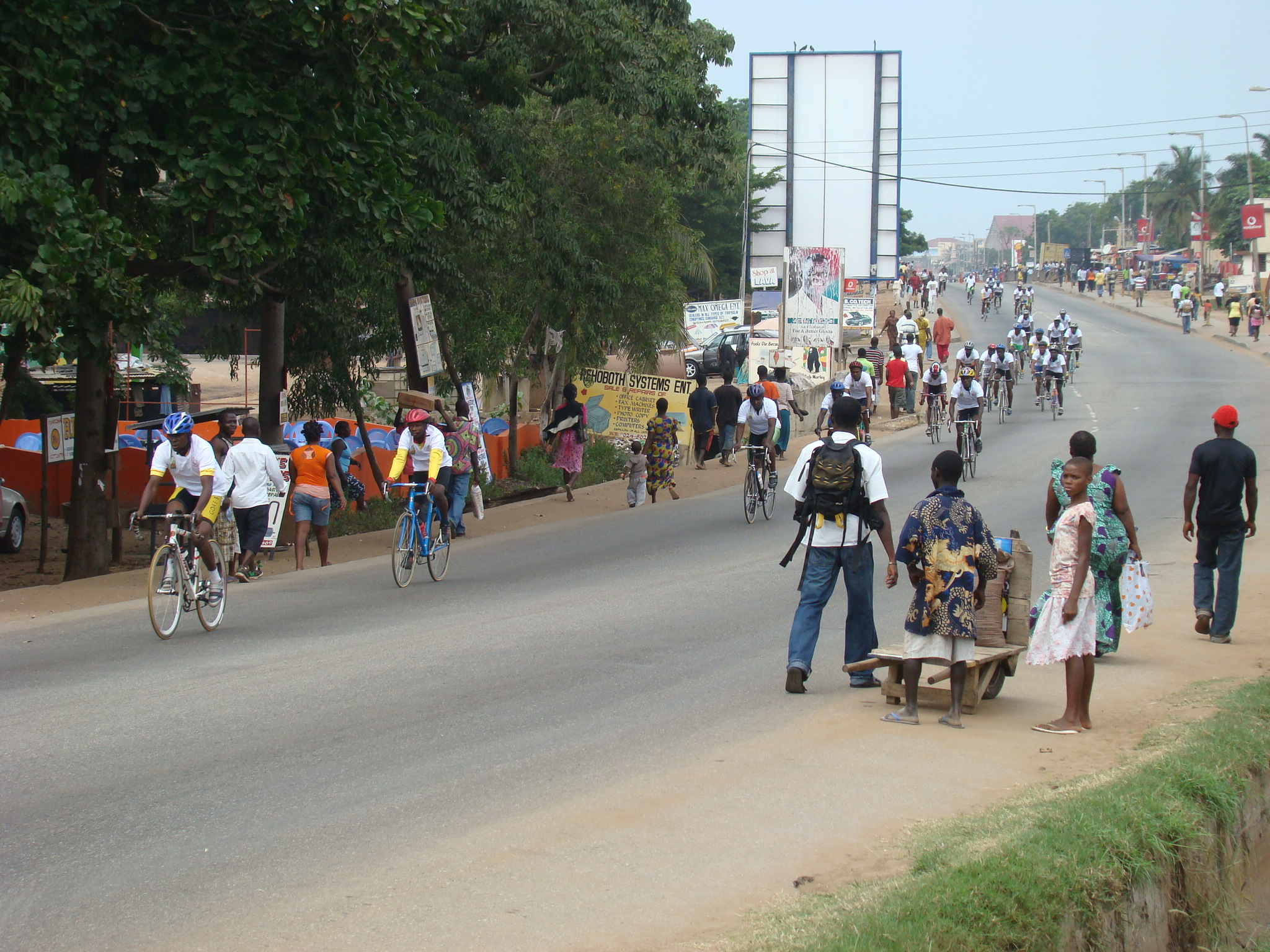 Course cycliste organisée à Teshie lors du festival Homowo 2009